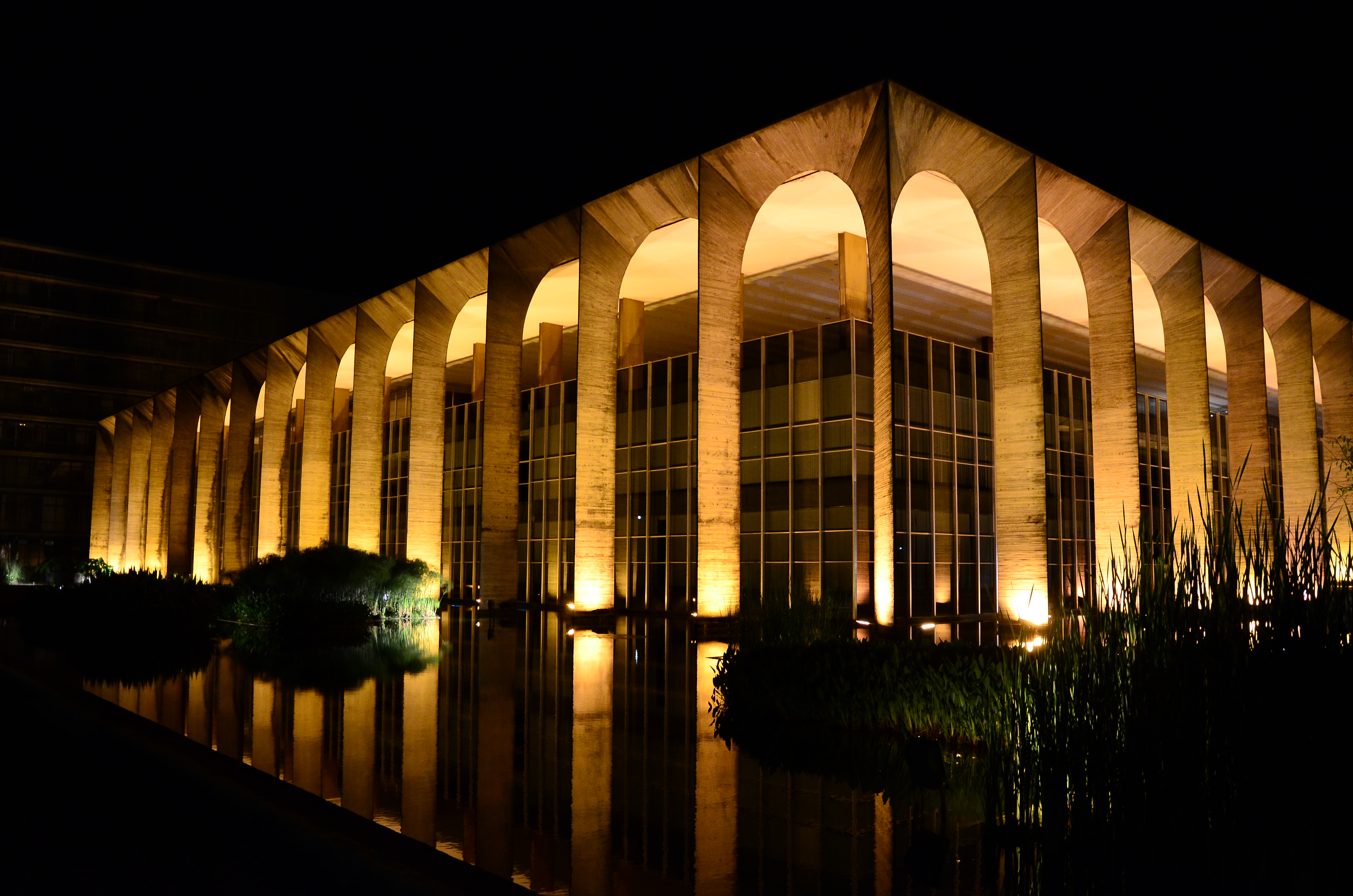 Foto noturna do Itamaraty